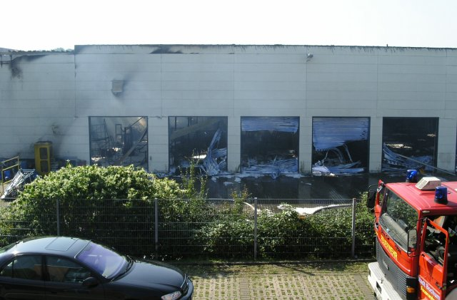 Ausgebranntes Requisitenlager des Schauspielhauses Bochum.